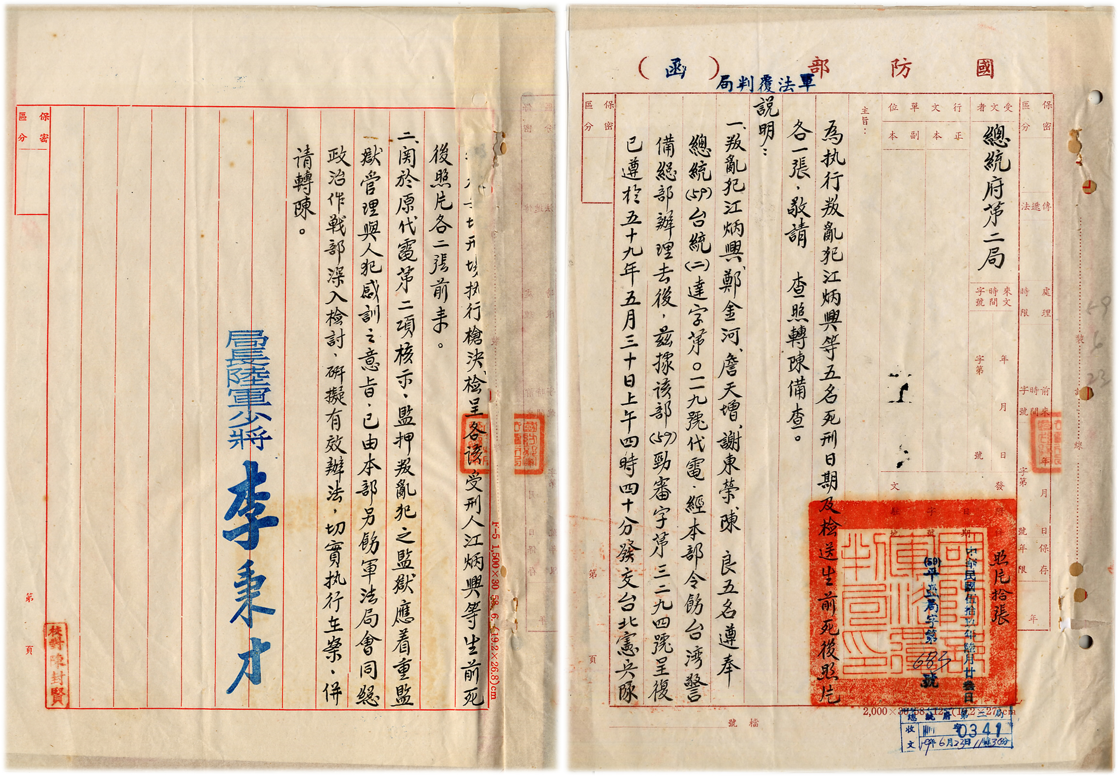 江炳興、鄭金河、陳良、詹天增、謝東榮叛變事敗遭槍決後，國防部軍法覆判局致總統府第二局函，陳報五人執行槍決時間，與生前、死後照片。